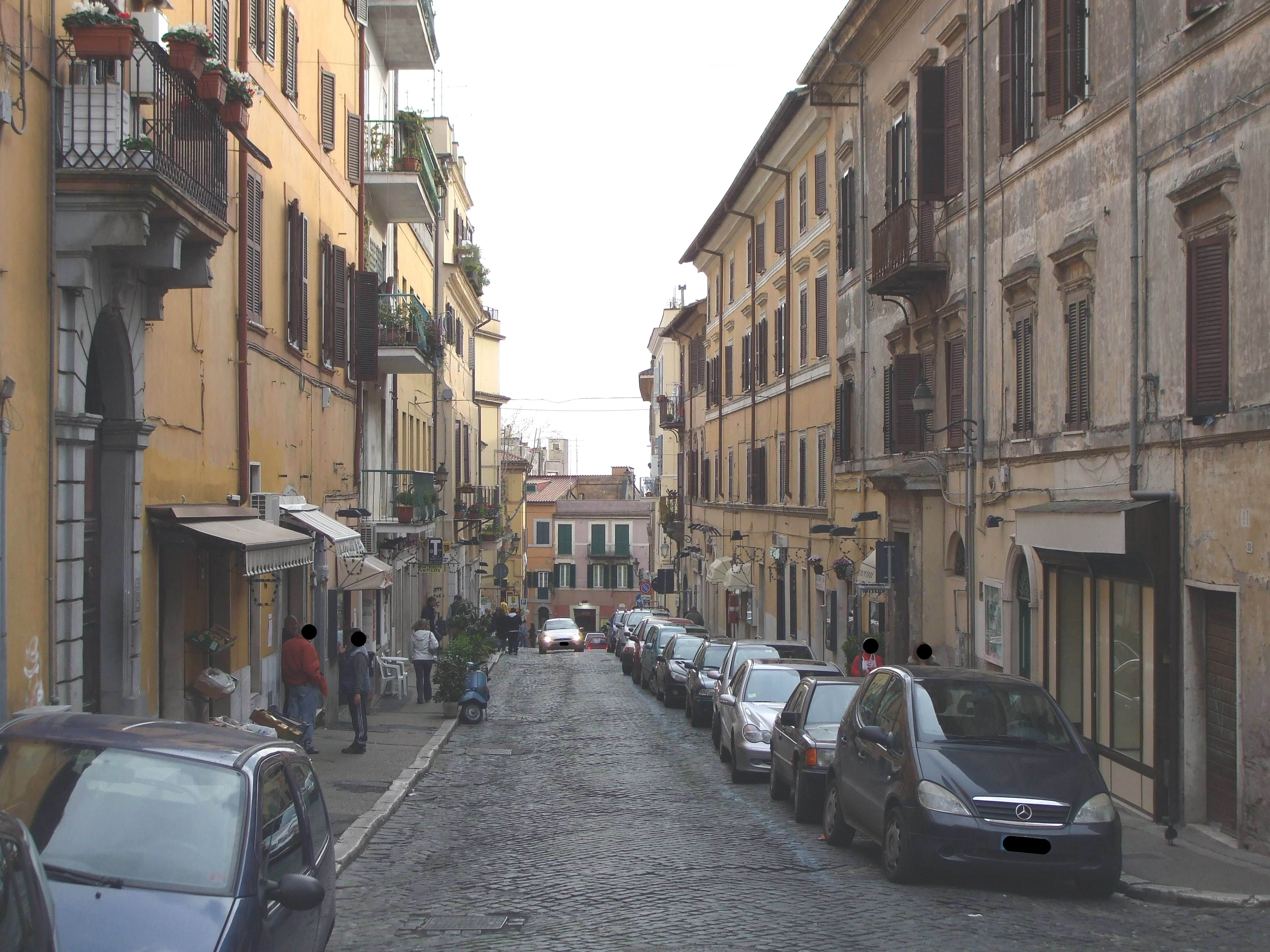 Albano Laziale, particolare del centro storico